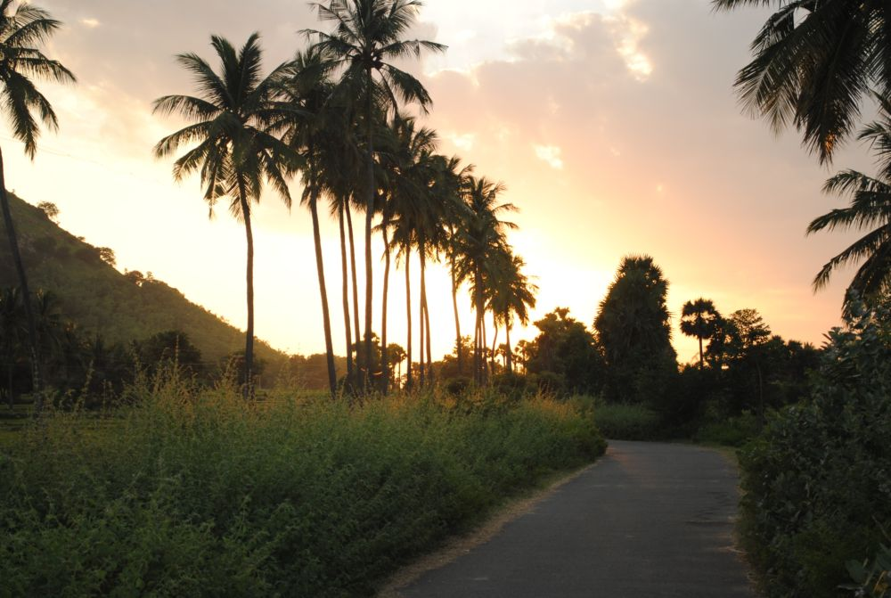 கொளக்கரவாடி தேவிகாபுரம் சாலை , மாலை நேர மயக்கம்